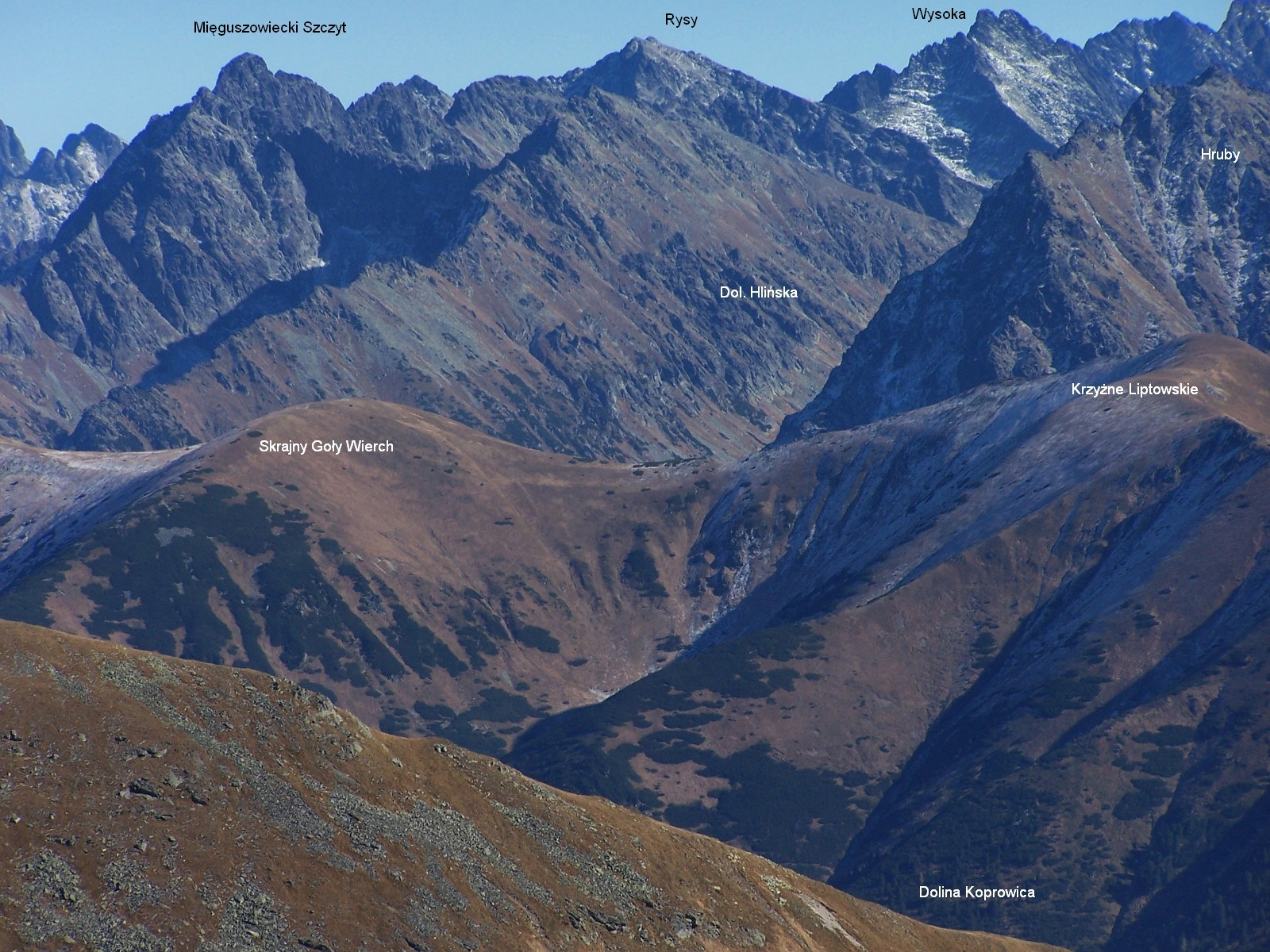 Szczyty Tatr Wysokich. Widok z Błyszcza